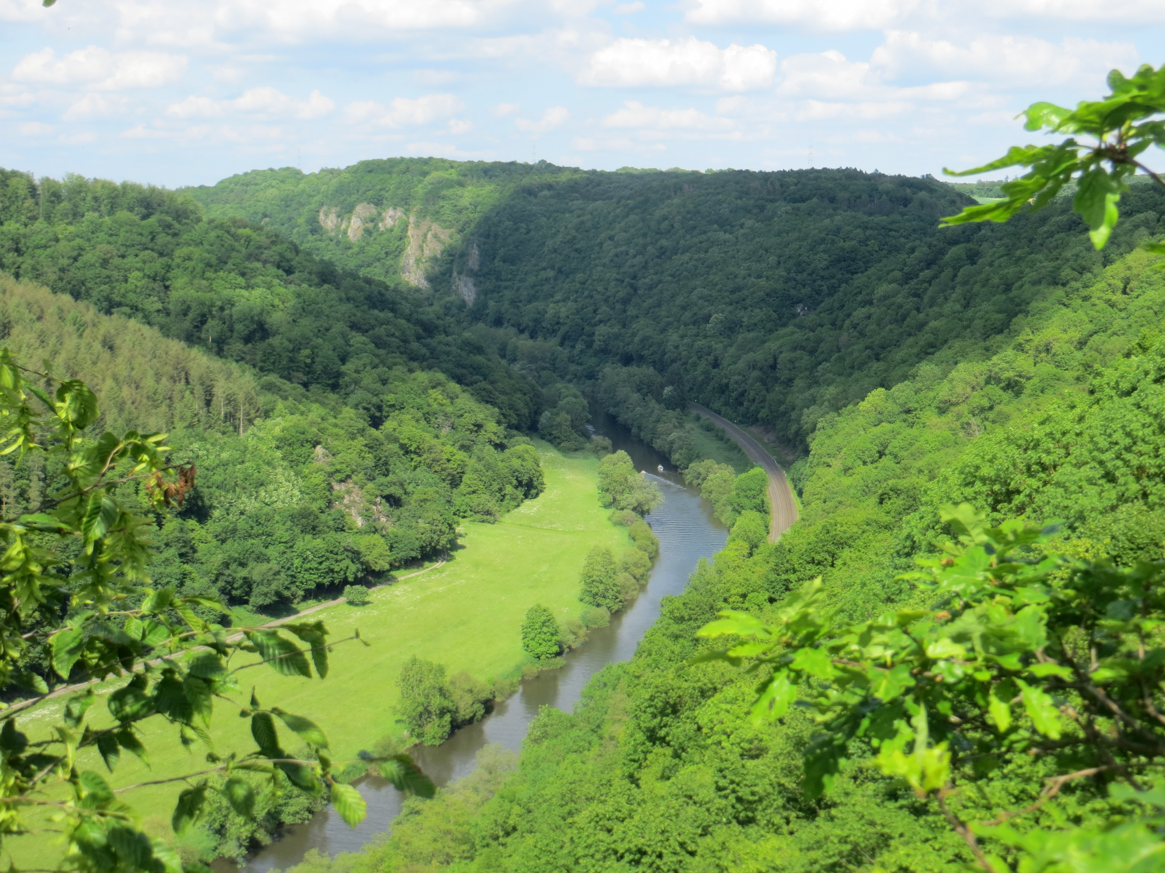 Blick aufs Lahntal mit Gabelstein beim Rückweg von Steinsberg.